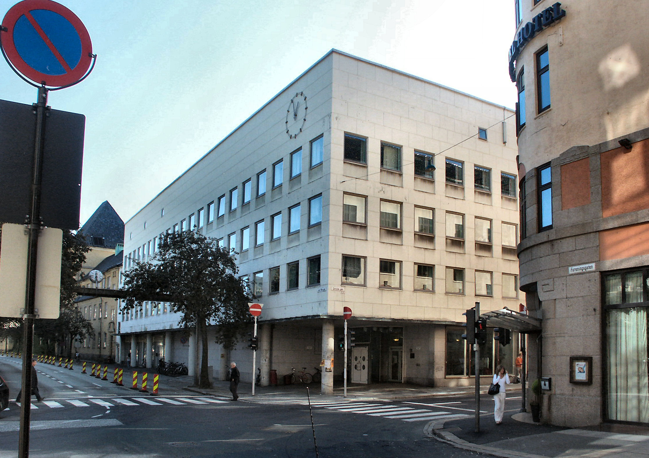 Bergen Trygdekasse 1948, now Det psykologiske fakultet, Lars Hilles gate, Bergen, Hordaland county, Norway. Architect Per Grieg, Bergen Norway. Photo: Frode Inge Helland. 2006.09.16.